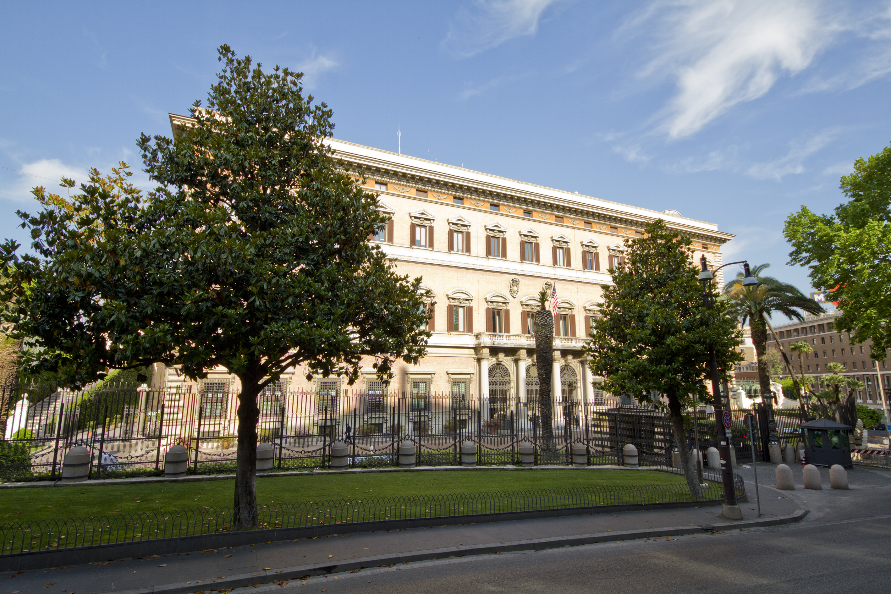 Roma ambasciata USA